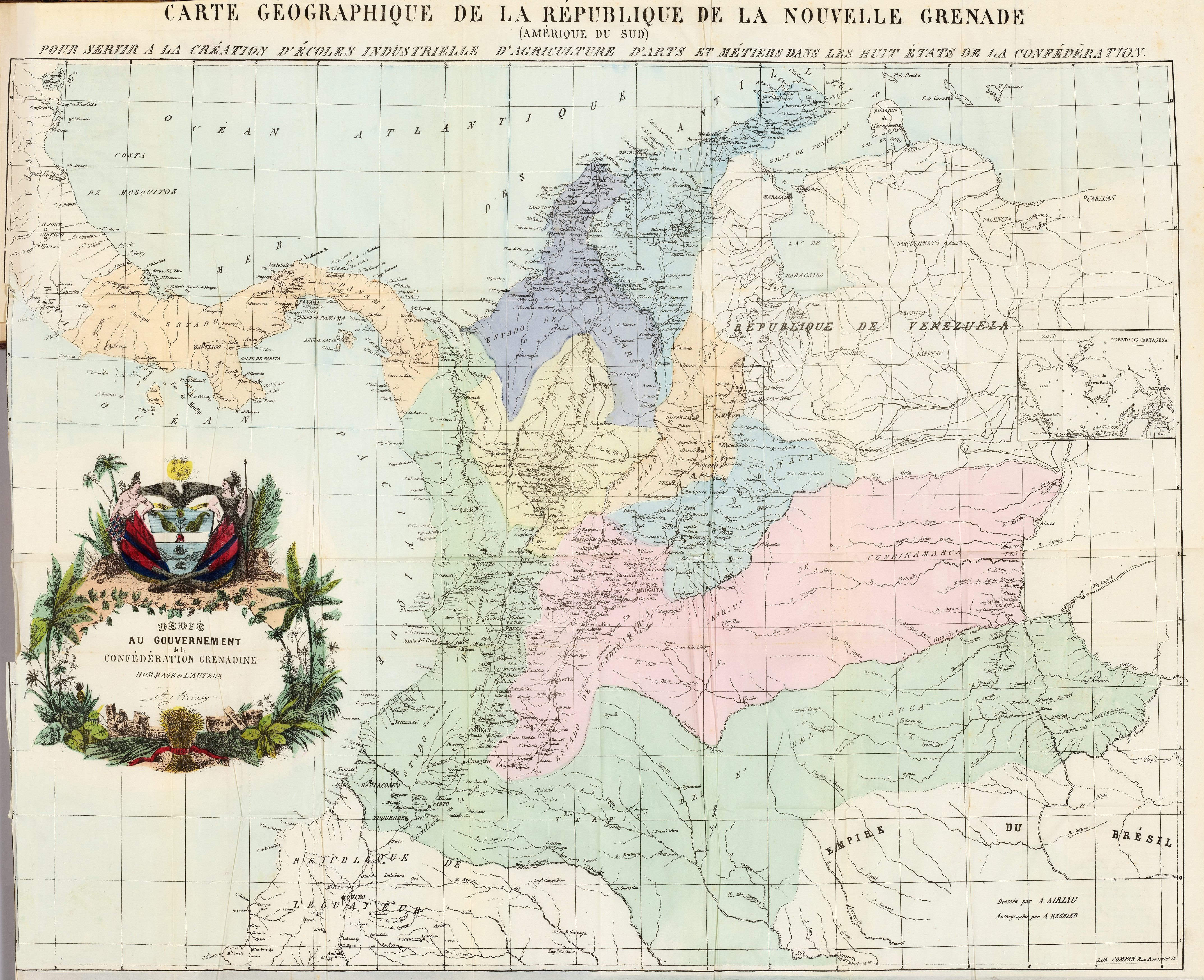 Carte Geographique de la Confédération Grenadine (Amérique du Sud) ; pour servir a la création d' écoles industrielle d'agriculture d'arts et métiers dans les huit états de la Confederation.